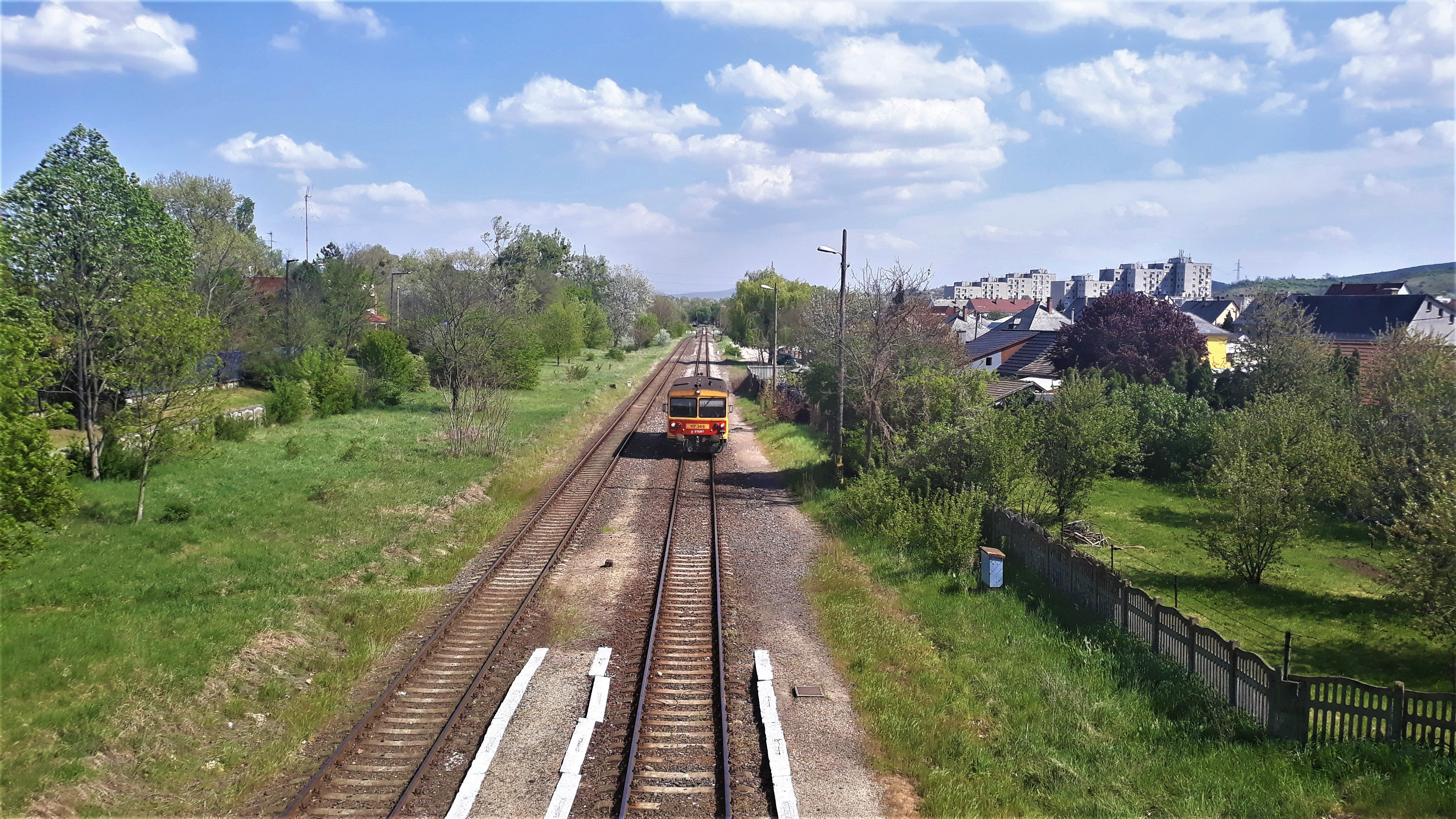 Bzmot 349 bejár Nyergesújfalu állomásra. A gyalogos felüljáróról nézve